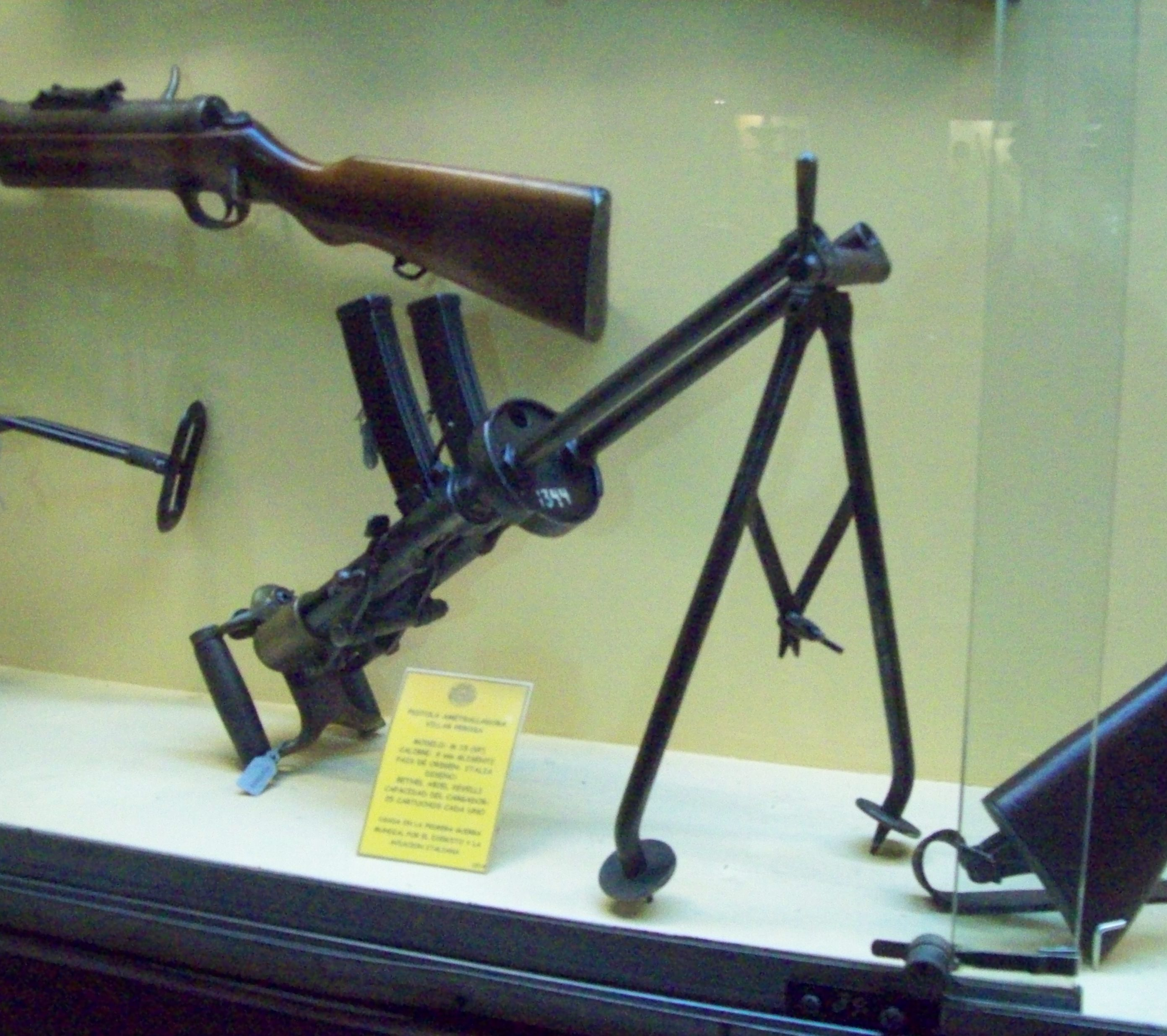 expuesto en el Museo de Armas, ciudad de Buenos Aires, Argentina 2014.